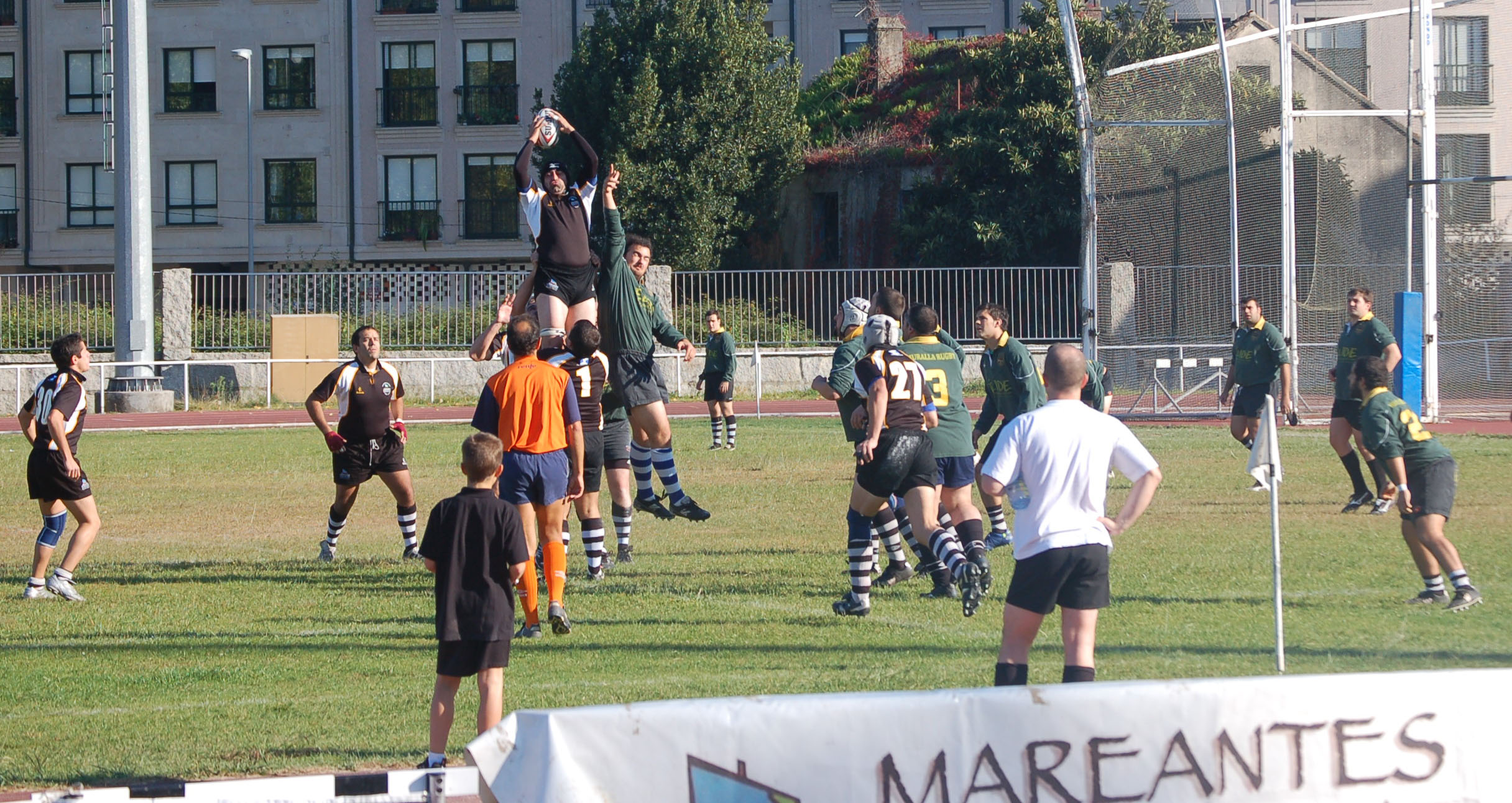 Touche nn encontro en tre o Mareantes de Pontevedra e o Muralla de Lugo